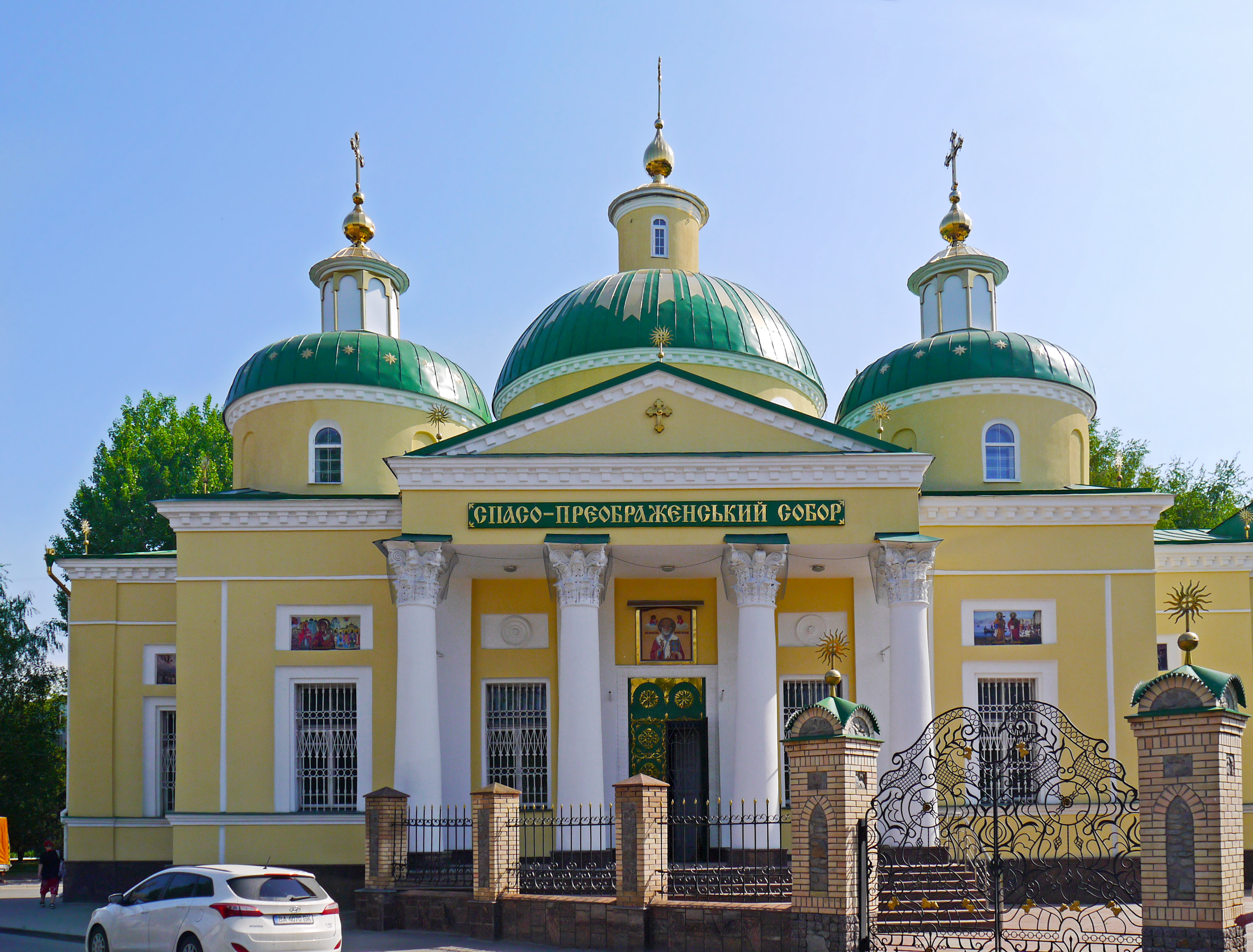 Преображенська церква, Кропивницький, вул. Преображенська, 22